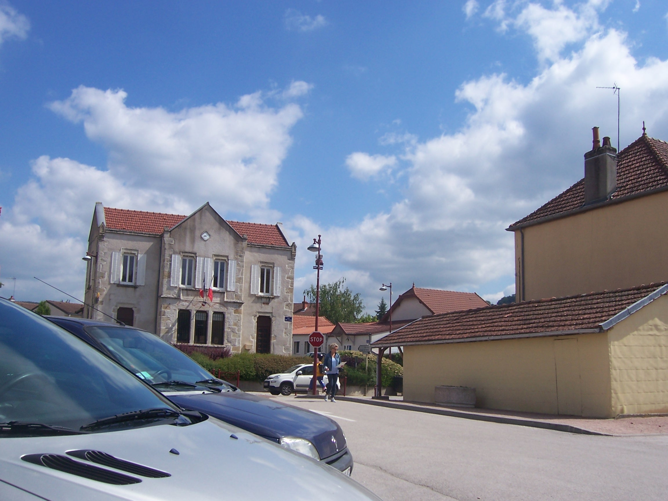 Mairie de Marmagne